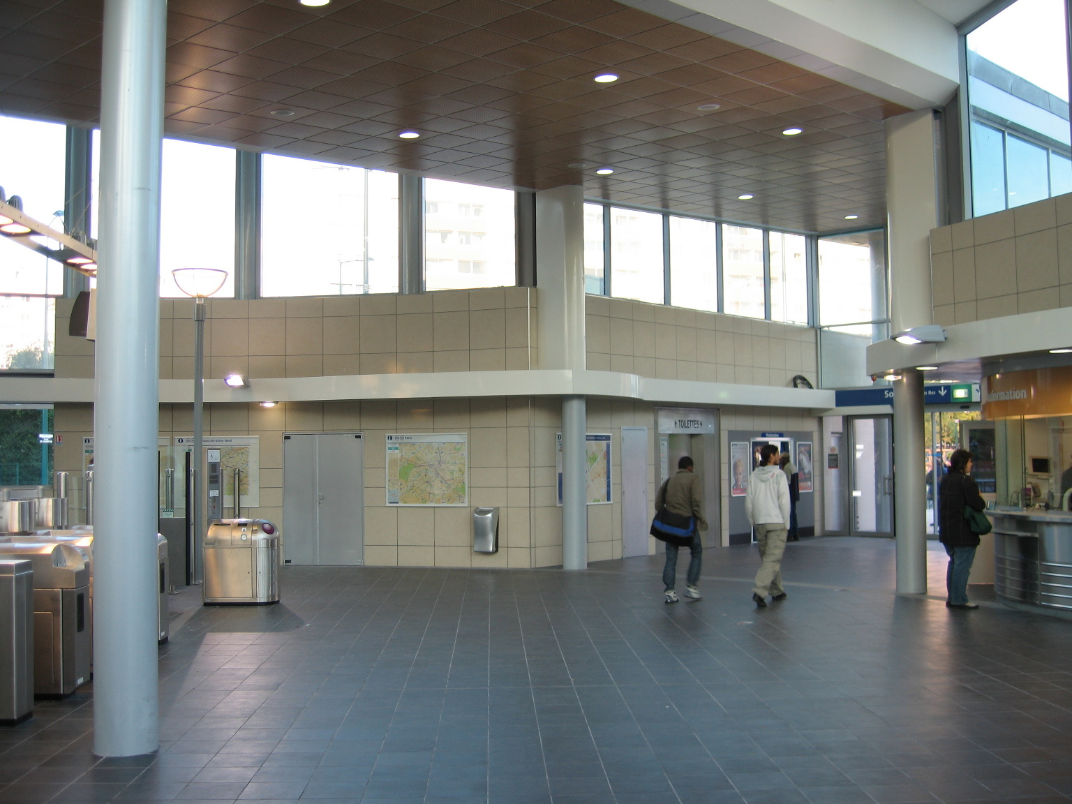 Asnières - Gennevilliers - Les Agnettes, ligne 13 du métro de Paris, le jour de l'inauguration.